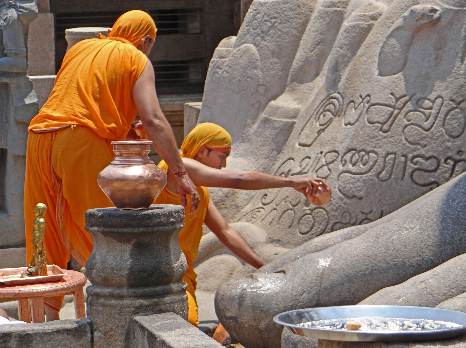 Célébration d'une puja au pied de la statue monumentale de Gomateshwara (Bahubali) dans le sanctuaire jaïn Cette statue est au sommet de la colline Vindhyagiri ou Indragiri, un des lieux sacrés de la religion jaïne, construit au XIIème siècle mais ce lieu de culte remonte à l'antiquité. Shravanabelagola ou Sravanabelgola est une ville de l'État du Karnataka en Inde, dans le district d'Hassan. C'est le plus important centre religieux du Jaïnisme, surtout connu pour la colossale statue de Gomateshvara. Extrait de Wikipedia